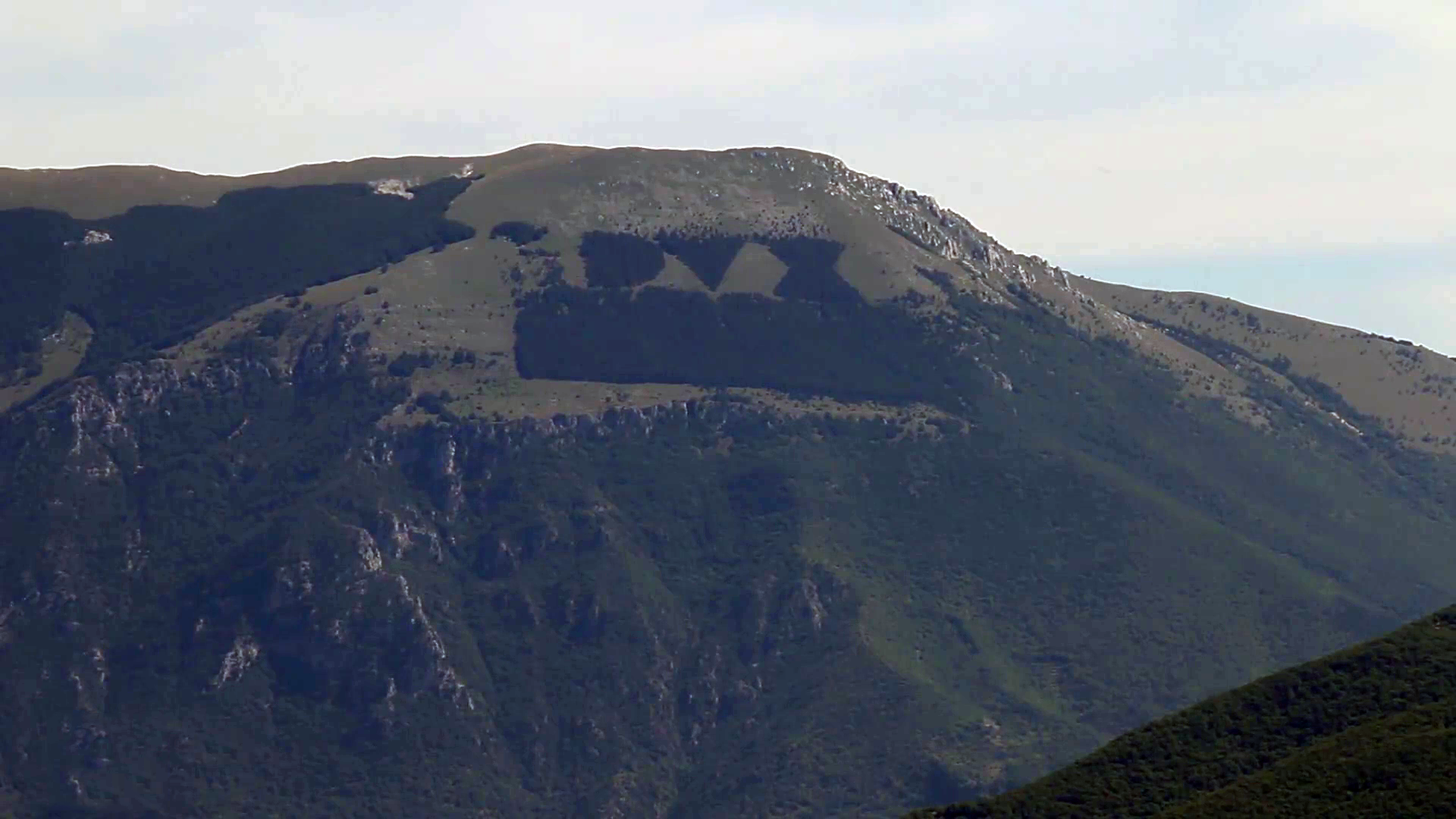 Il "bosco DUX", una pineta realizzata nel 1939 in omaggio a Mussolini sul Monte Giano, in provincia di Rieti (Lazio). Foto scattata da Calcariola (frazione di Cittaducale).